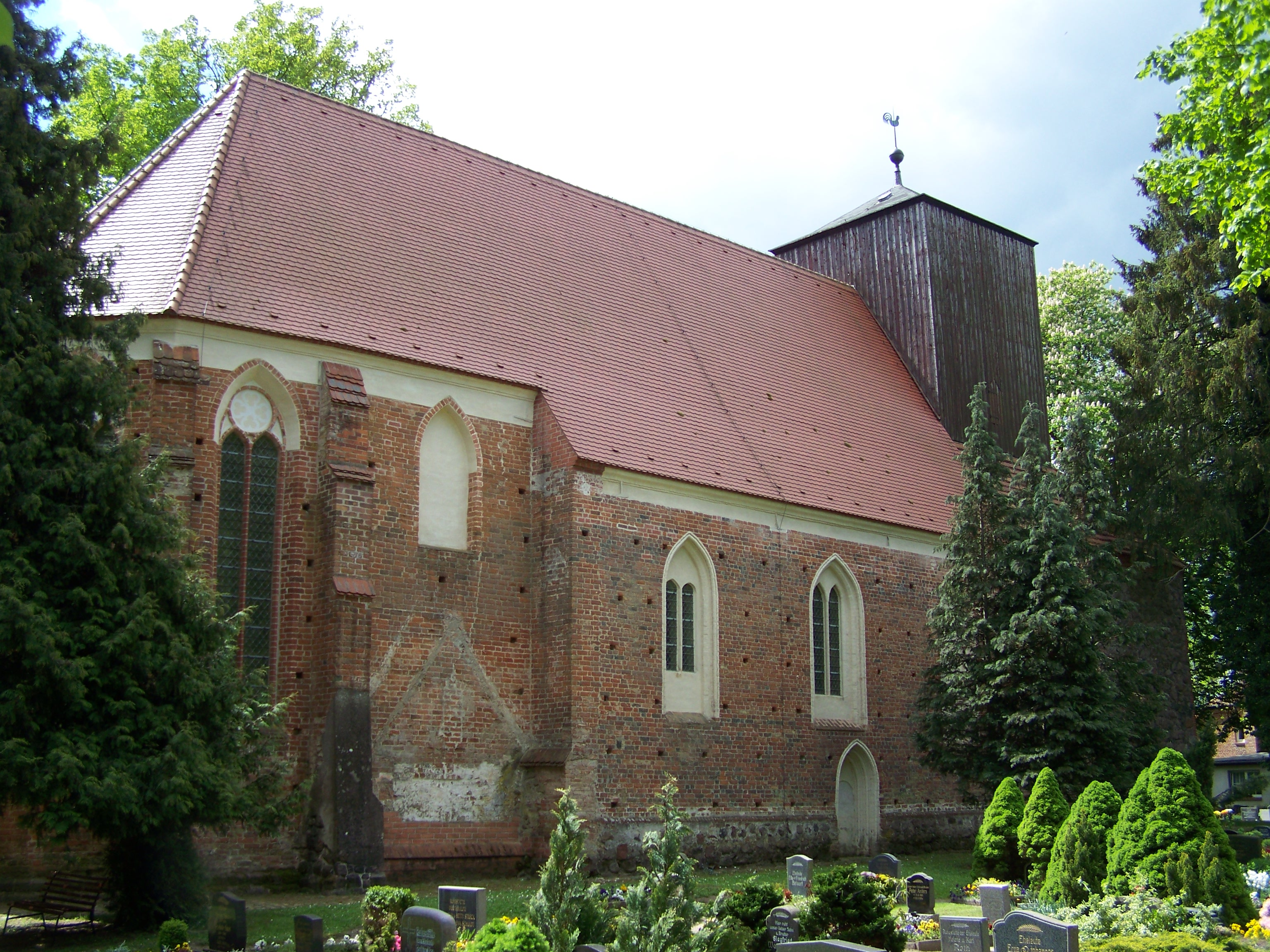 Kirche in Glewitz, Vorpommern (2009-05-13)